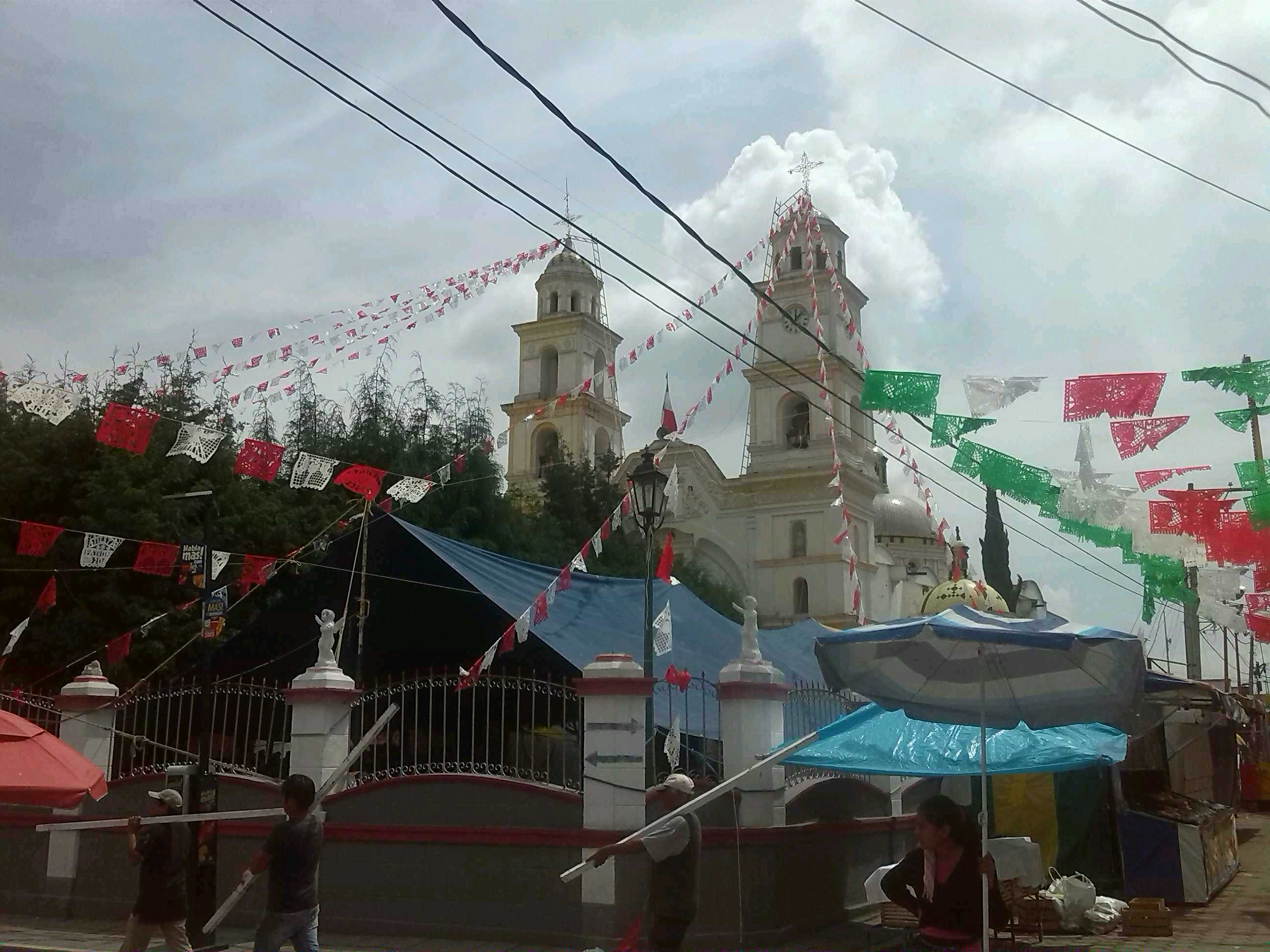 Centro de Tepetitla, Tlaxcala